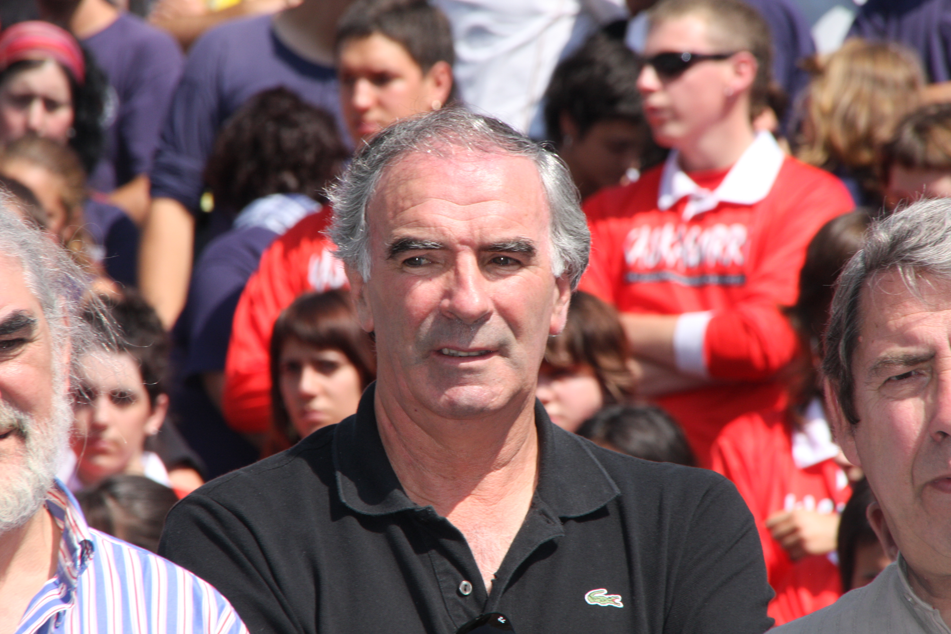 José Ángel Iribar, ex portero y directivo del Athletic Club de Bilbao, en un acto de apoyo a Sonia Polo, comparsera y activista que había recibido amenazas tras ser elegida txupinera de la Semana Grande de Bilbao (España) de 2009.